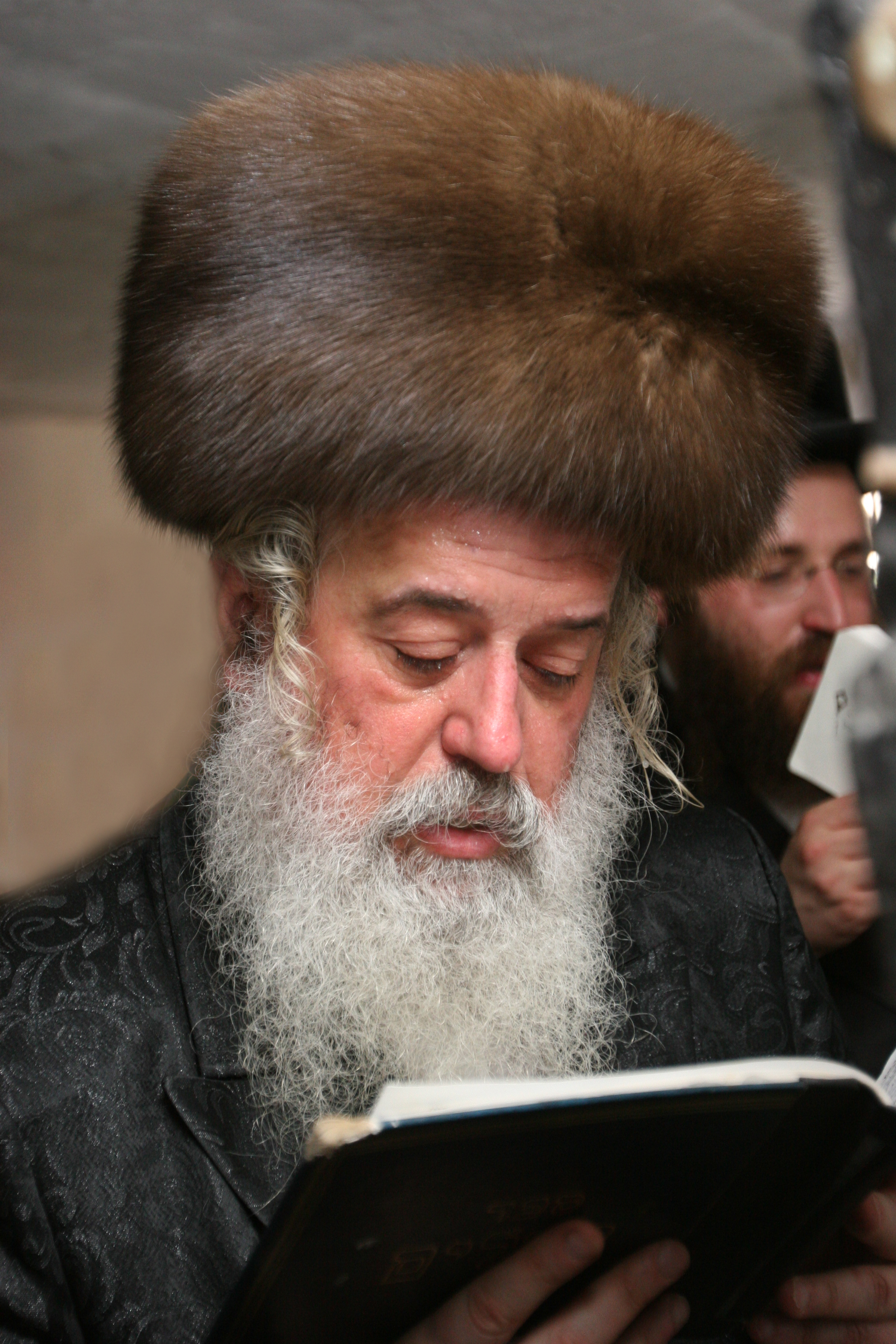 Rabbi Moshe Leib Rabinovich, Munkacser Rebbe, wearing a kolpik